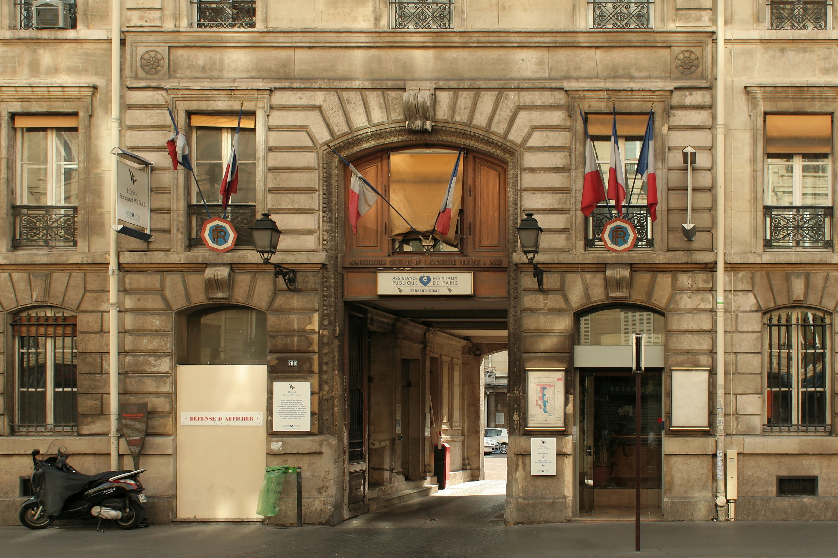 Hôpital Fernand-Widal, Paris 10e. Entrée sur la rue du Faubourg-Saint-Denis.